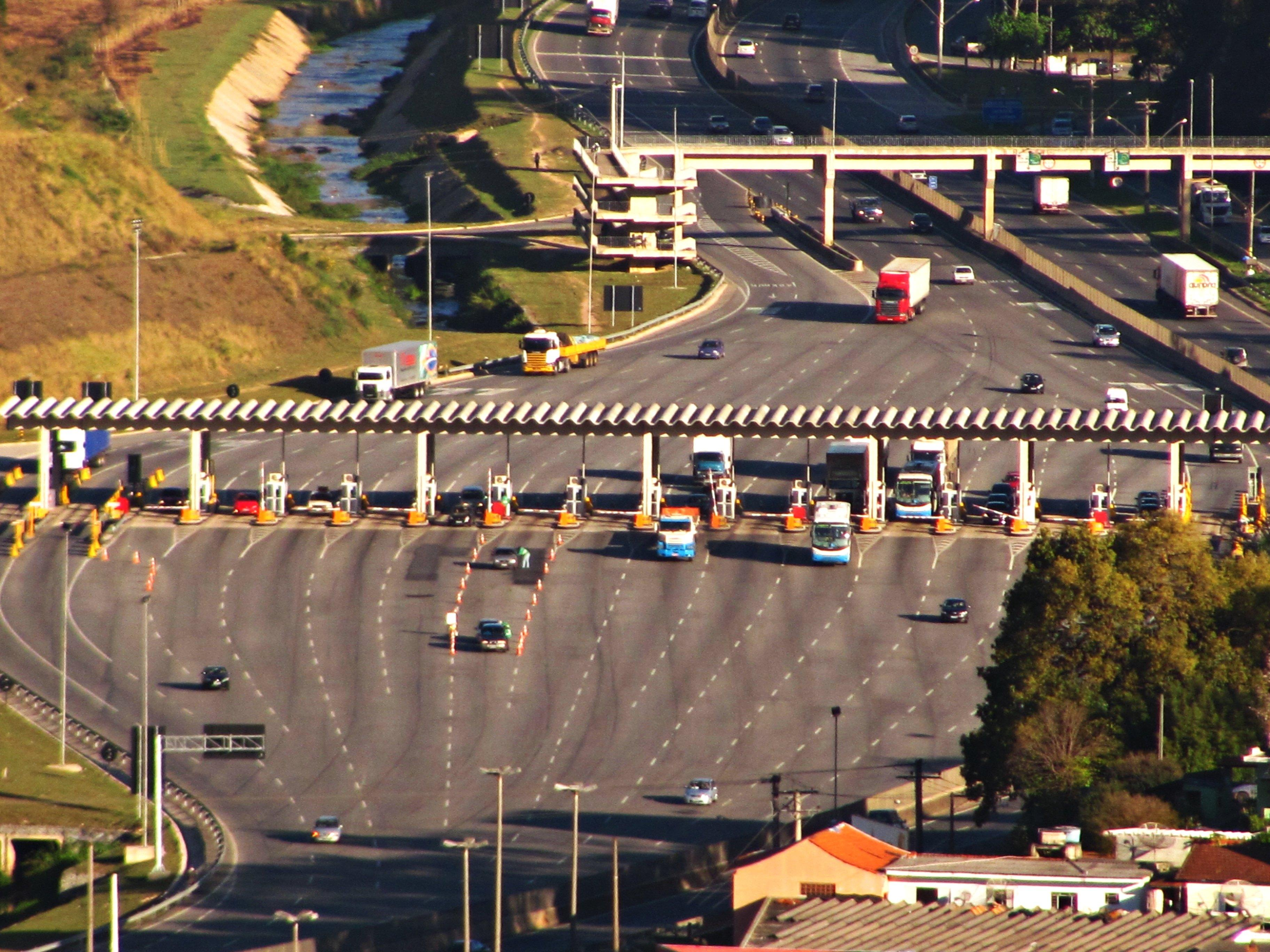 Vista da praça de Pedágio no centro de Mairiporã. Sentido Belo Horizonte da Rodovia Fernão Dias.